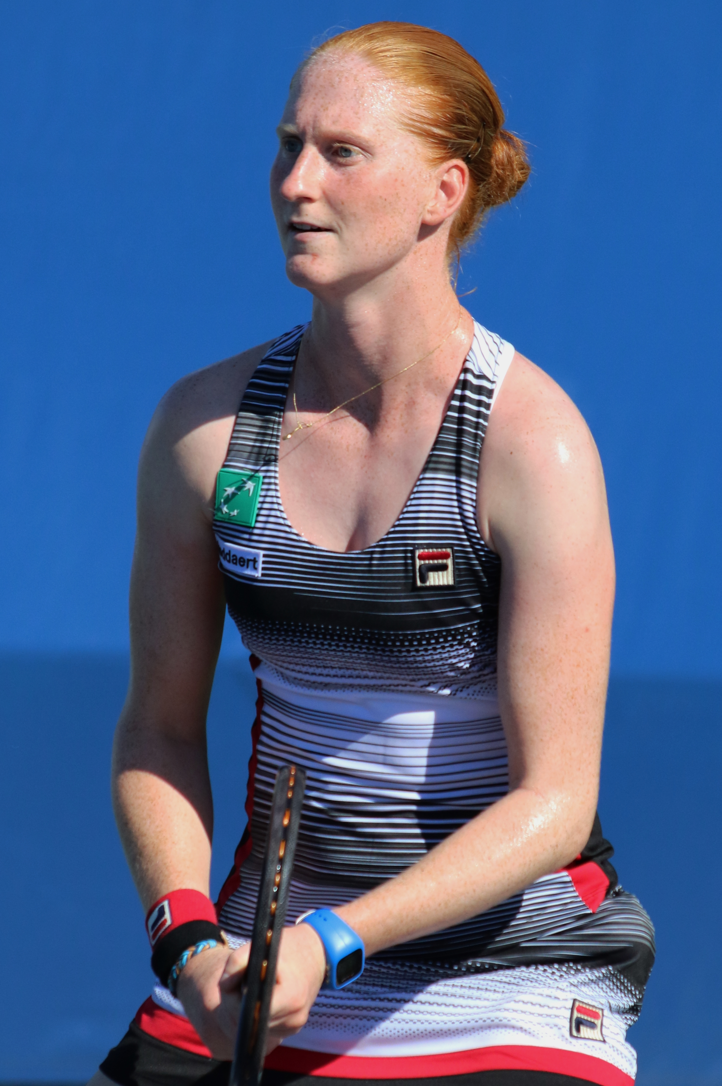 Van Uytvanck US16 (6)